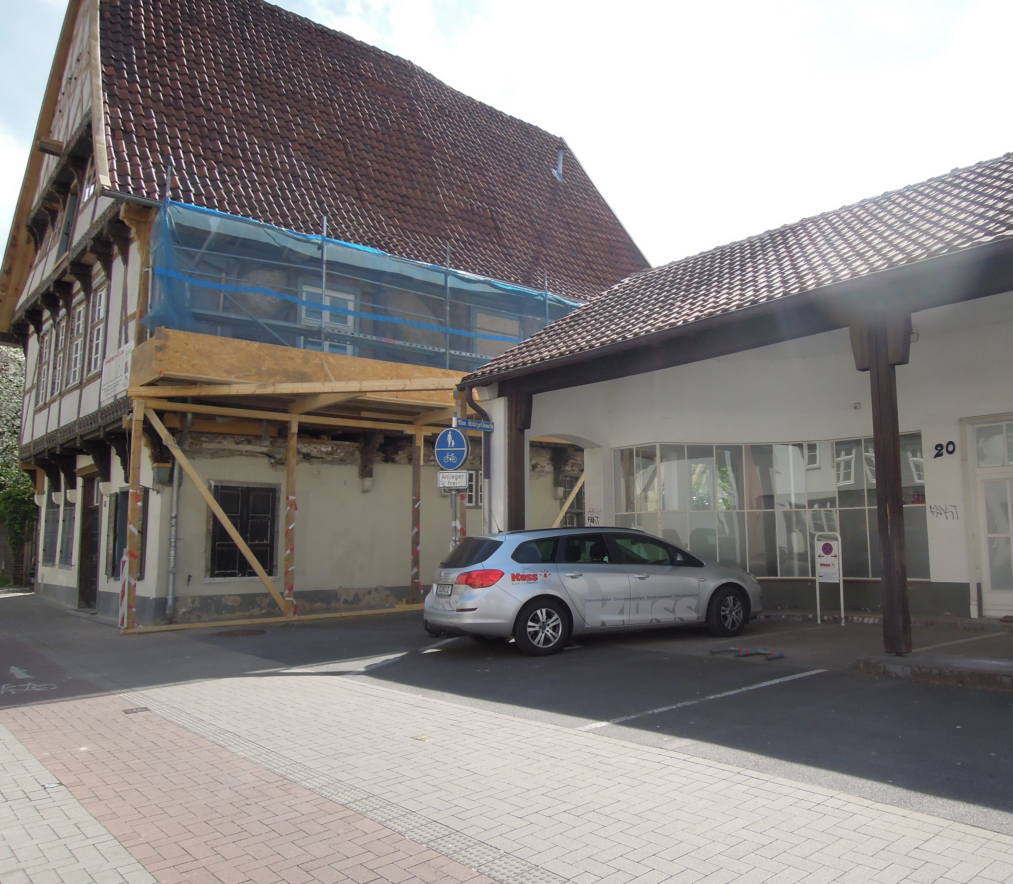 Stolpersteinlage Soest Thomästraße 20